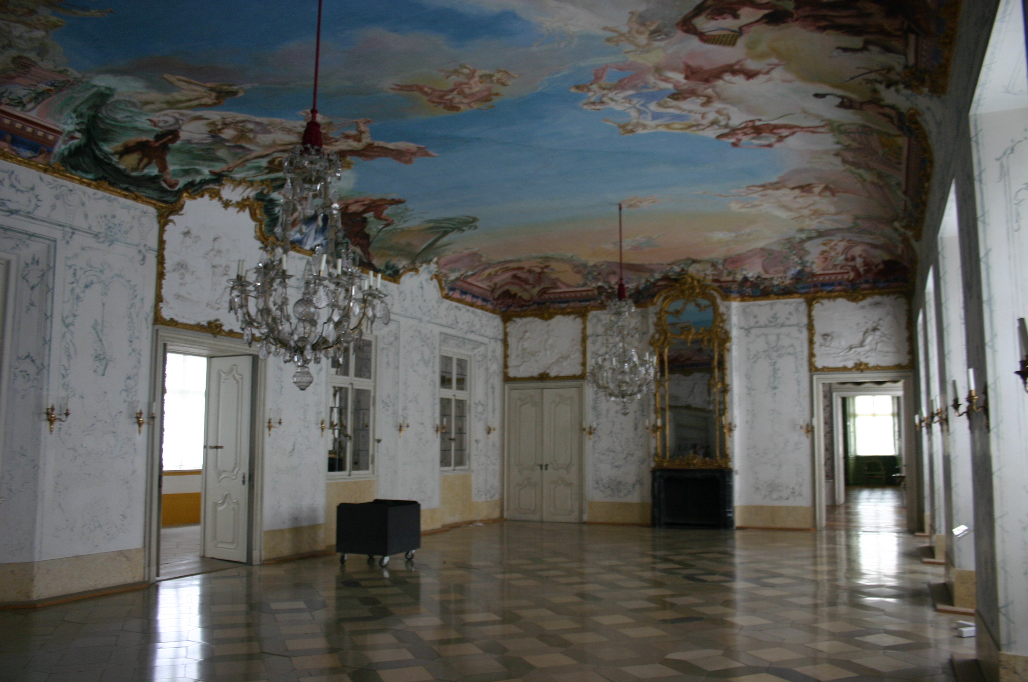 Weisser Saal Schloss Seehof